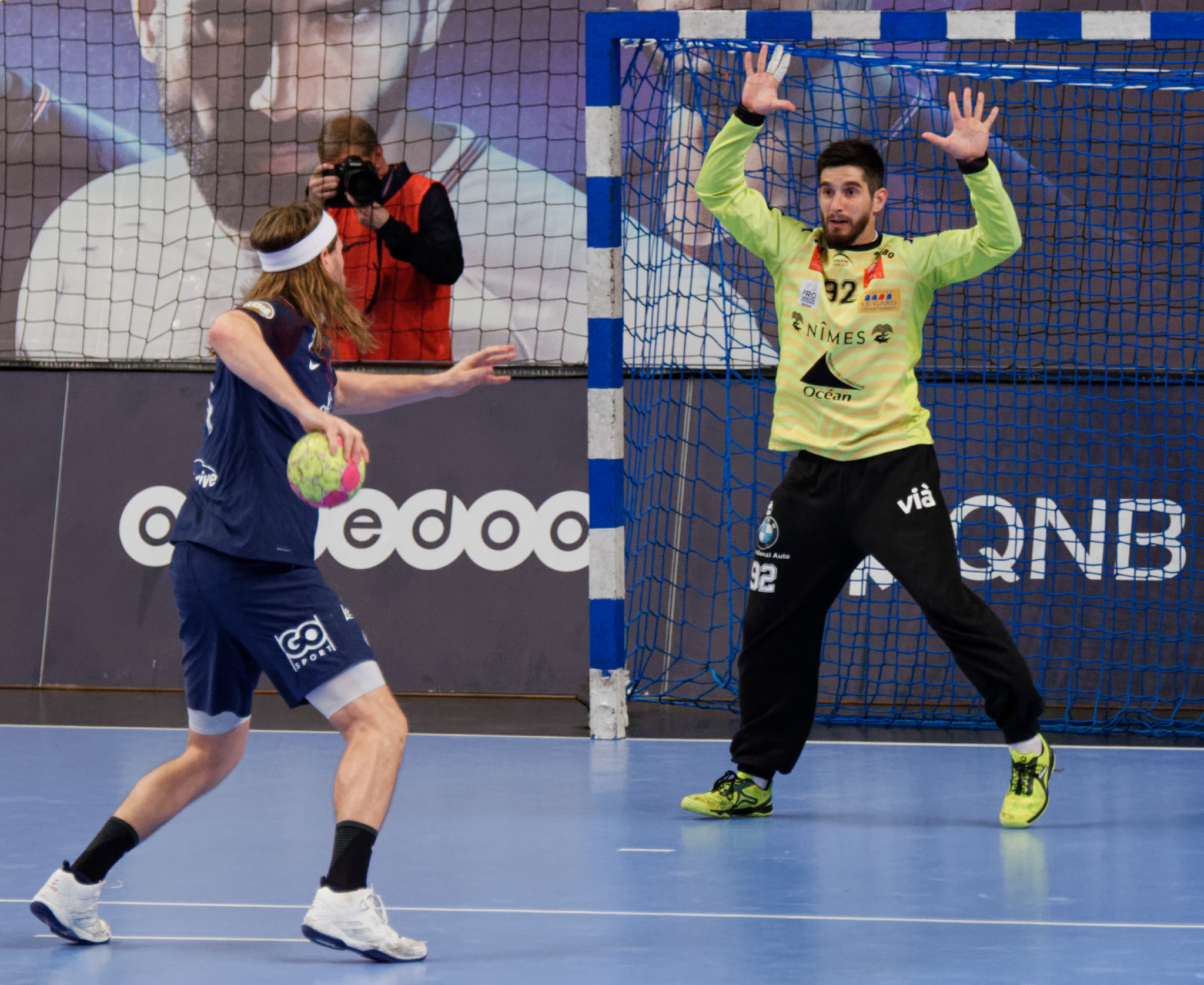 Rencontre de championnat entre le PSG et l'USAM Nîmes. A Coubertin, le 22 mars 2018.